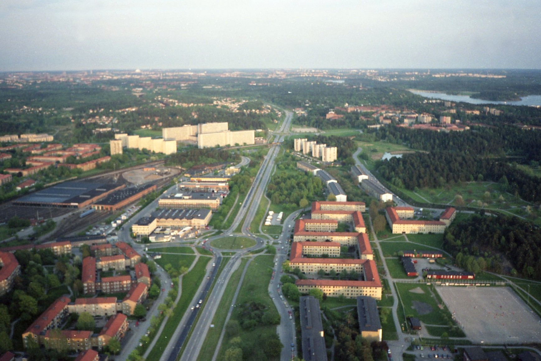 Bergslagsvägen från ballong i höjd med Vällingby mot nordväst i maj 1988. Till höger syns Grimsta, och till vänster Vällingbydepån och längre fram Råcksta och Vattenfalls huvudkontor.